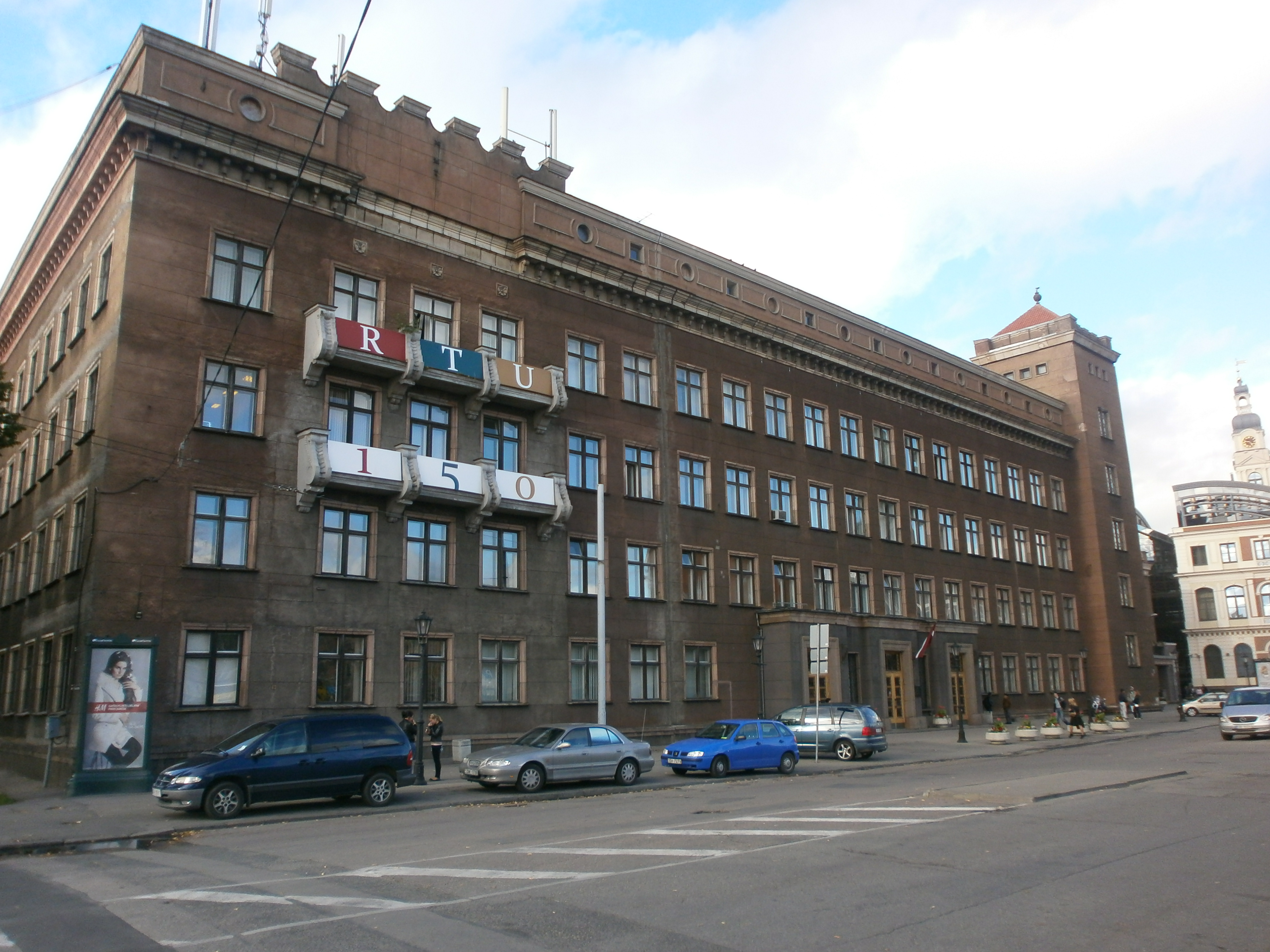 Рижский политехнический институт